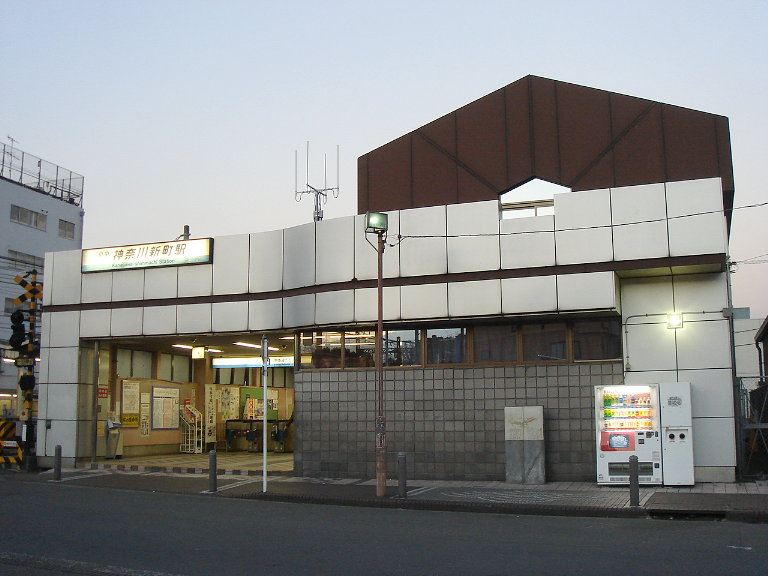 京急本線ja:神奈川新町駅・中央口駅舎 投稿者↑PON（ウエポン）が2007年1月8日に撮影 一部編集の上で2007年1月16日にアップロード